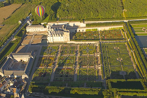 Vue ouest du château de Villandry et ses jardins à la Française.